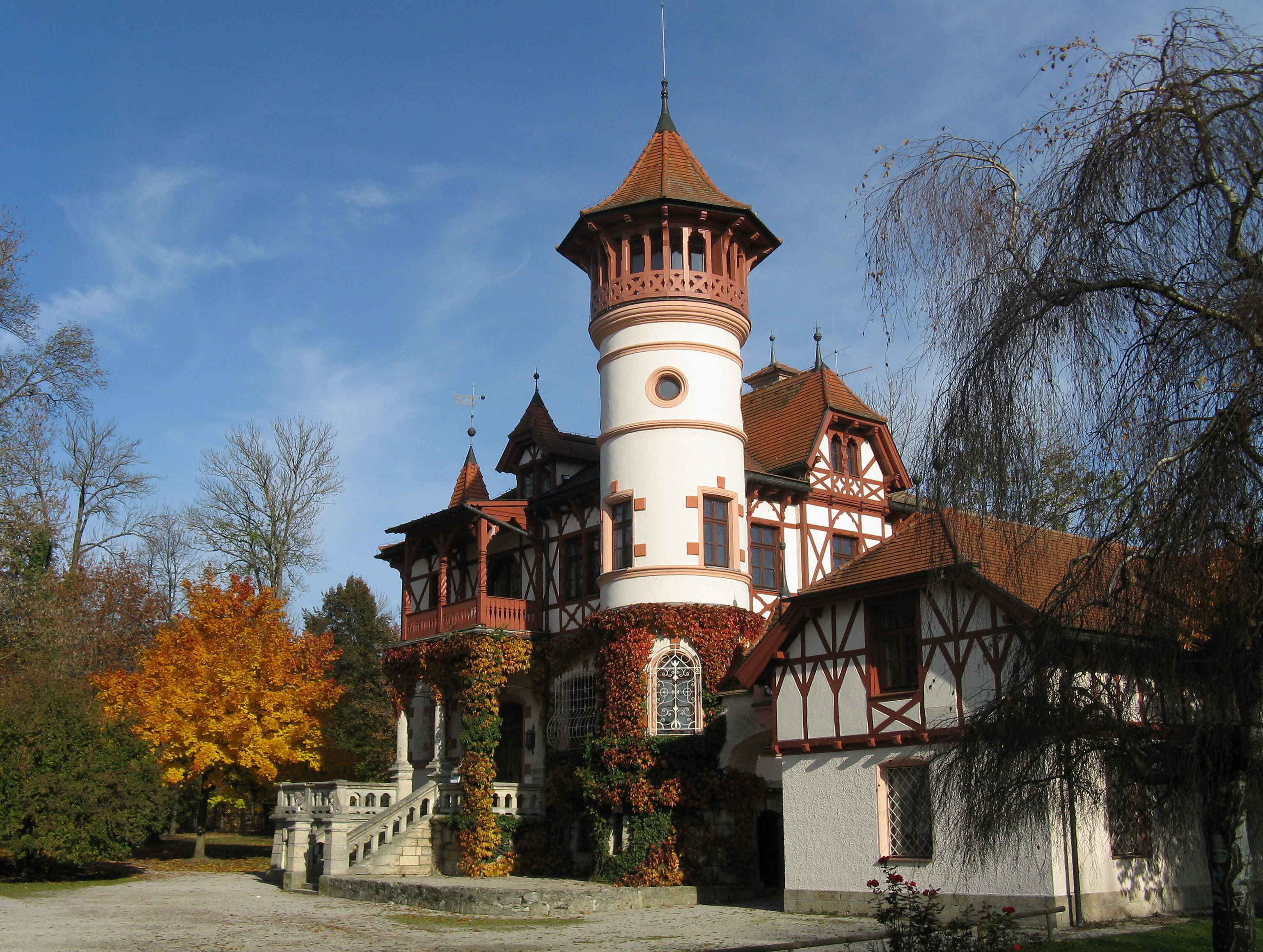 Herrsching am Ammersee. Das jetzige Kurparkschlösschen, ein Neurenaissance-Bau mit Eckturm, Loggia und Terrasse mit Freitreppe, ließ sich der Maler Ludwig Scheuermann 1888/89 am Ufer des Ammersees erbauen.